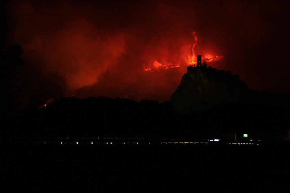 500px provided description: Monte Pisano in fiamme [#fire ,#mountain ,#toscana ,#tuscany ,#pisa ,#incendio]